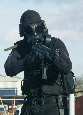 Traje del Servicio Aéreo Especial, se usa en zonas de combate